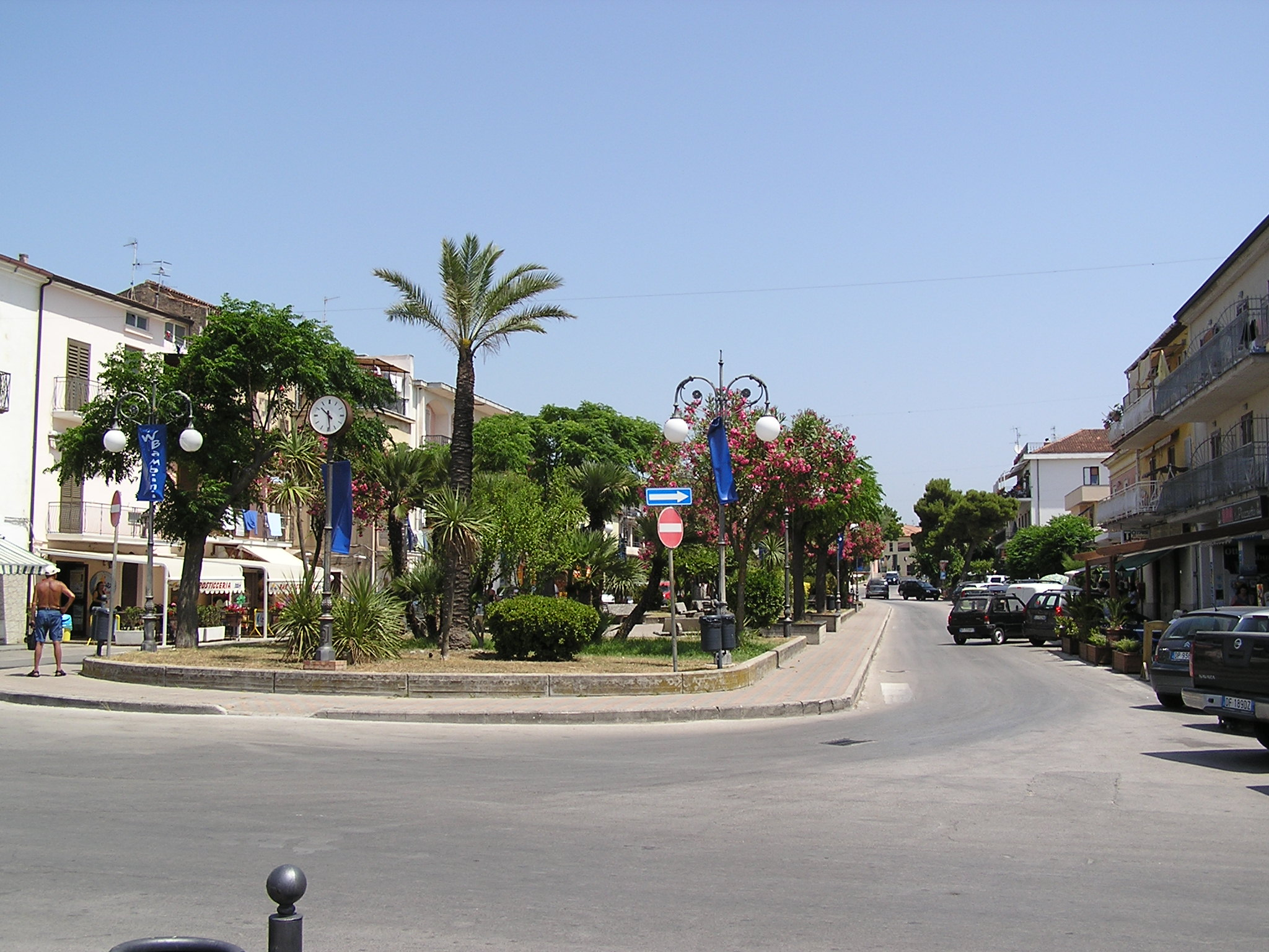 La piazzetta di Casal Velino Marina.